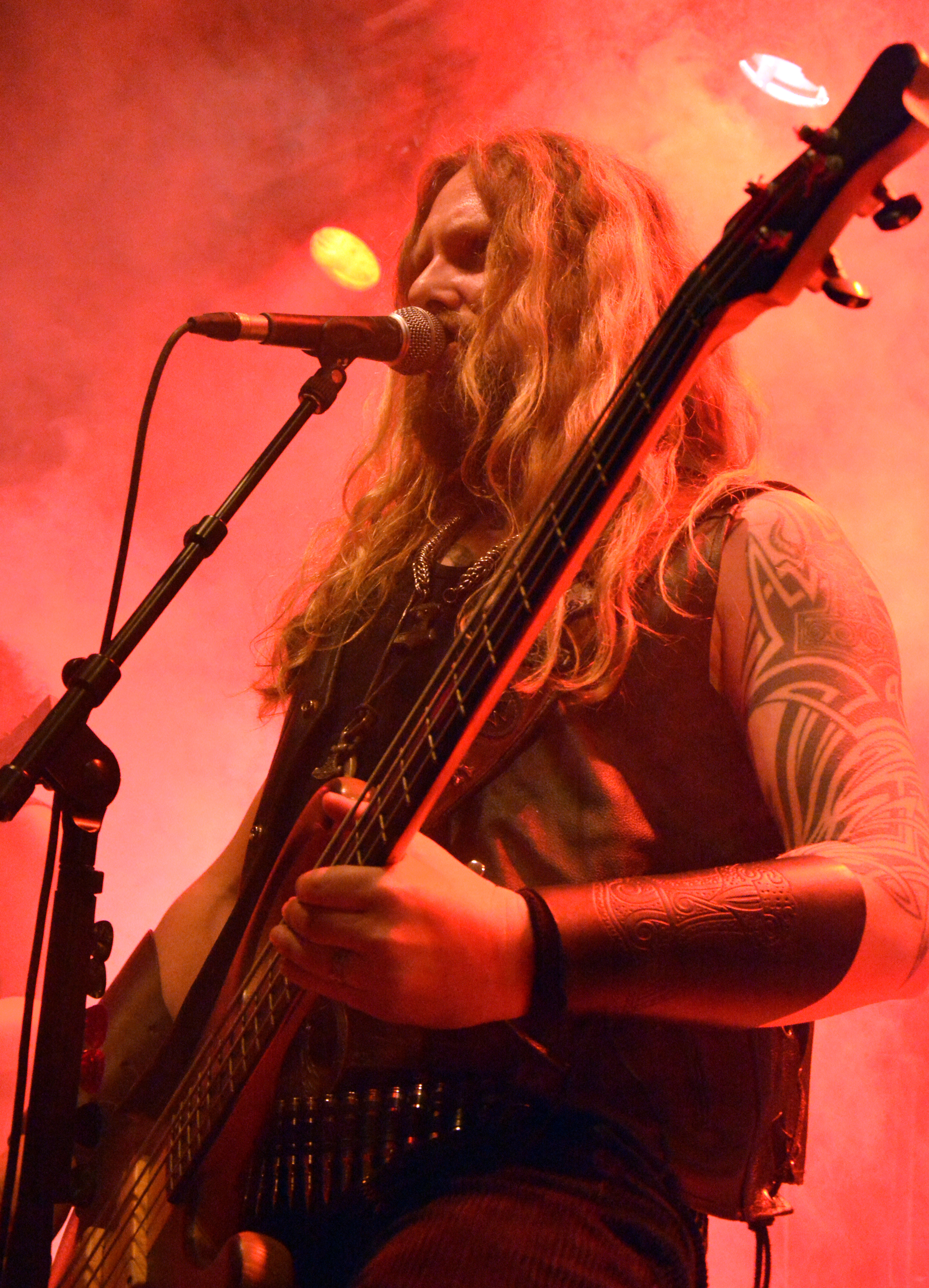 Musiker von Adorned Brood beim Heathen Rock Festivals 2014 im Rieckhof in Hamburg-Harburg